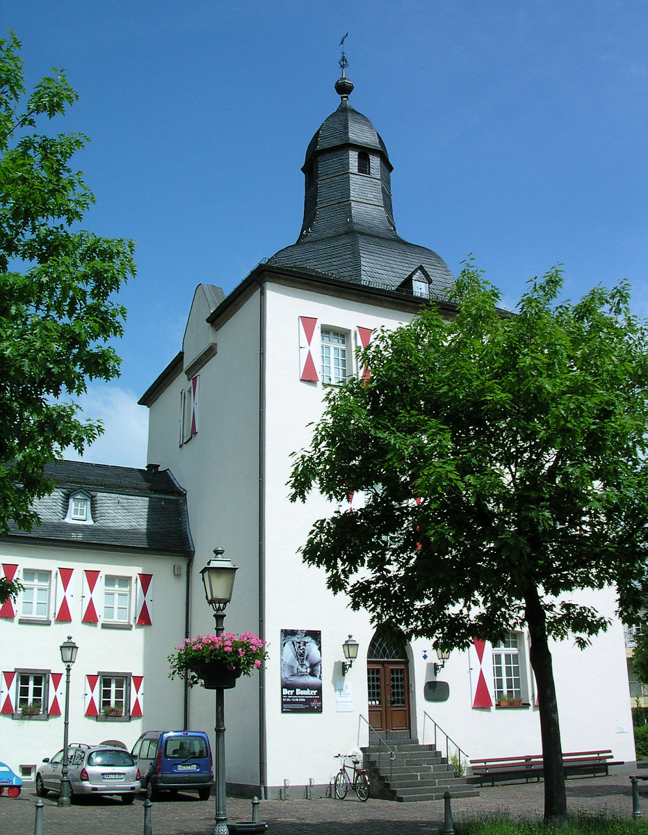 Weißer Turm, auch "Der alte Bau" und "Staffeler Turm" genannt, heute Stadtmuseum von Ahrweiler